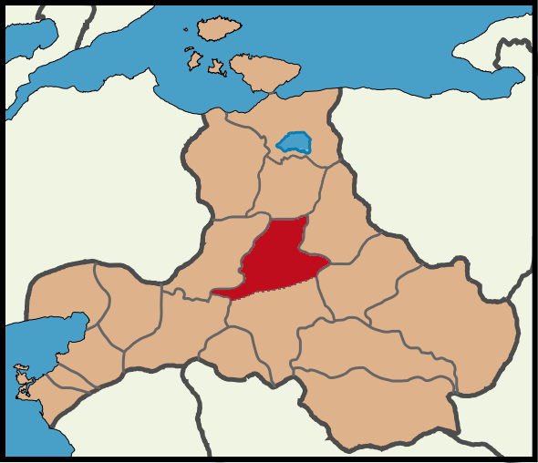 Balıkesir ilinde Karesi'nin konumu.